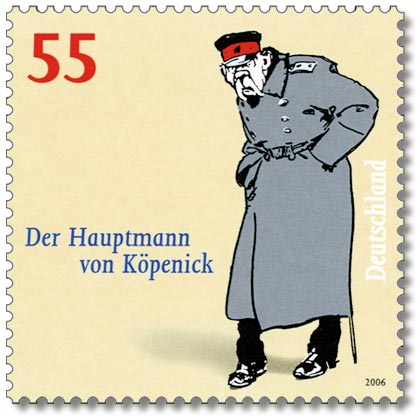 Der Hauptmann von Köpenick